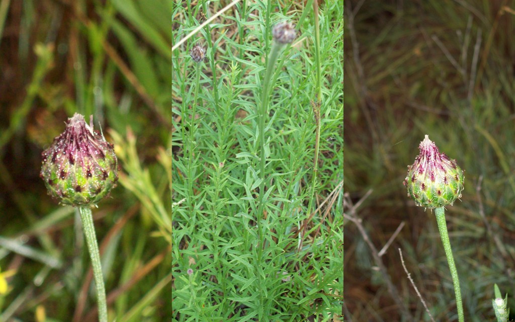 Centaurea tweediei. Asteraceae. Fotos tomadas al margen de la Ruta 30 sobre suelo húmedo en Bajada de Pena, departamento de Rivera, Uruguay.